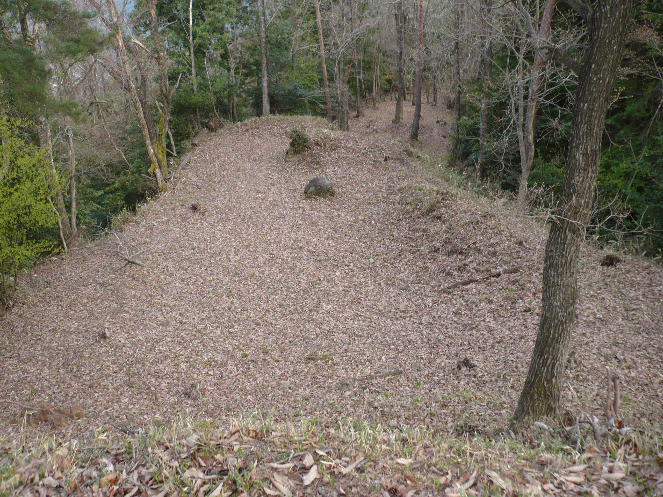 階段曲輪